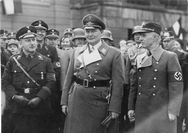 Die feierliche Amtseinführung des neuen Potsdamer Oberbürgermeisters, Generalmajor Friedrichs, durch den preuß. Minsterpräsidenten General Hermann Göring, welchem gleichzeitig die Ehrenbürgerschaft der Stadt Potsdam verliehen wurde am 10. März 1934. Der preußische Ministerpräsident General Hermann Göring, mit dem neuen Potsdamer Oberbürgermeister Generalmajor [Hans] Friedrichs (rechts) und dem Oberpräsidenten der Provinz Brandenburg [Wilhelm] Kube (links) nach der feierlichen Amtseinführung